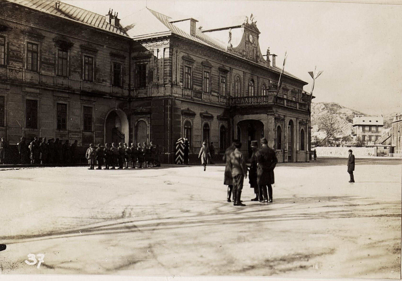 Regierungsgebäude in Cetinje.